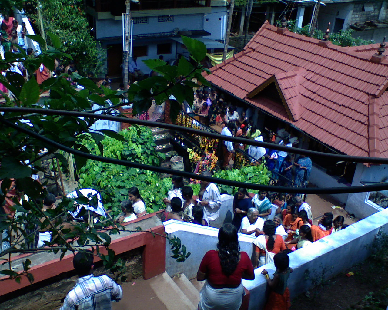 പനച്ചിക്കാട് ദക്ഷിണ മൂകാമ്പിക ക്ഷേത്രം